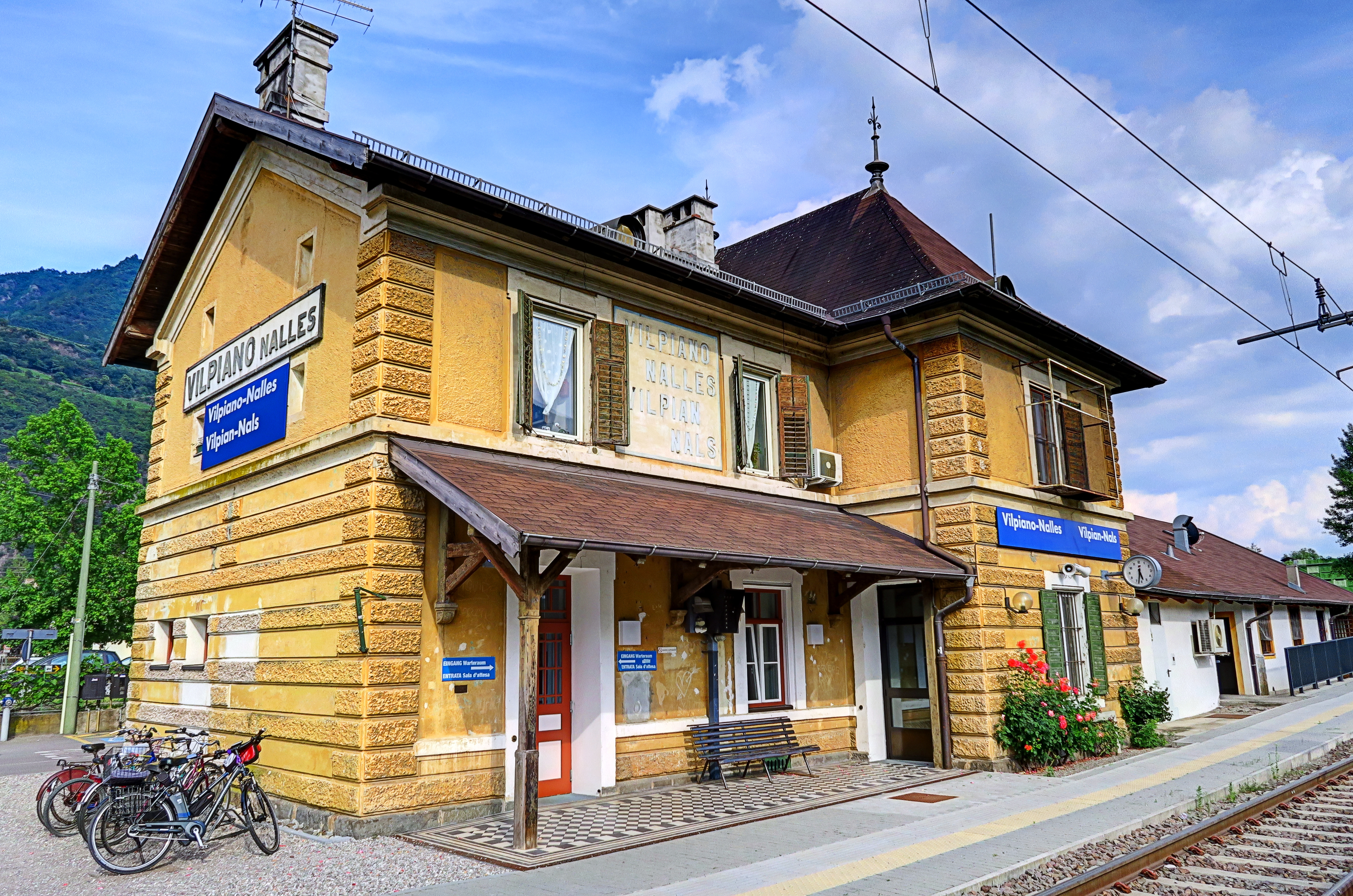 Italien, Südtirol: Bahnhof Vilpian-Nals auf der Bahnstrecke Bozen-Meran